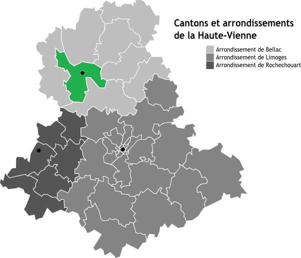 Canton de Bellac, Limousin, France en Carte des arrondissements de la Haute-Vienne